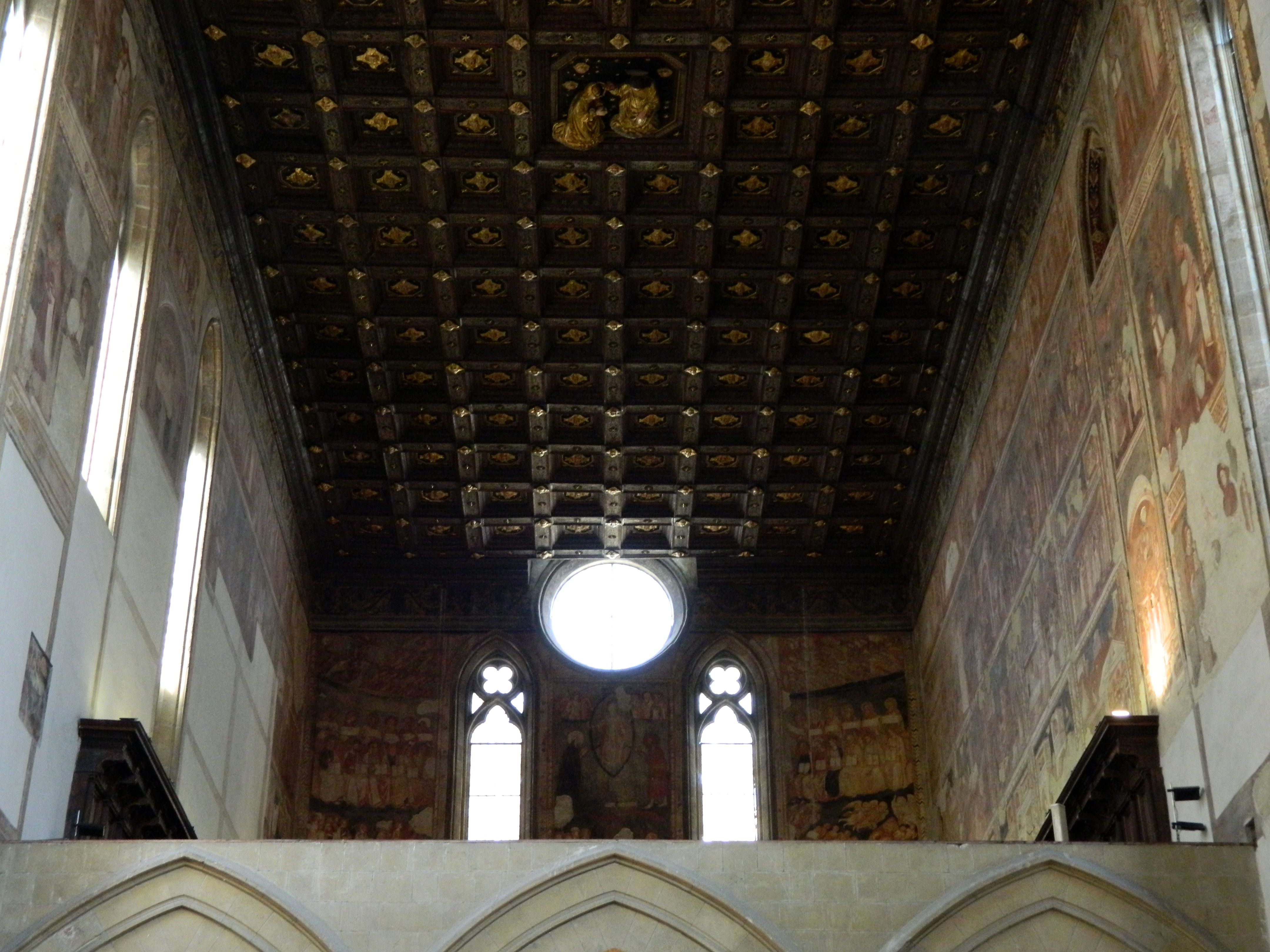 Coro delle monache di Santa Maria Rgina Vecchia (Napoli)